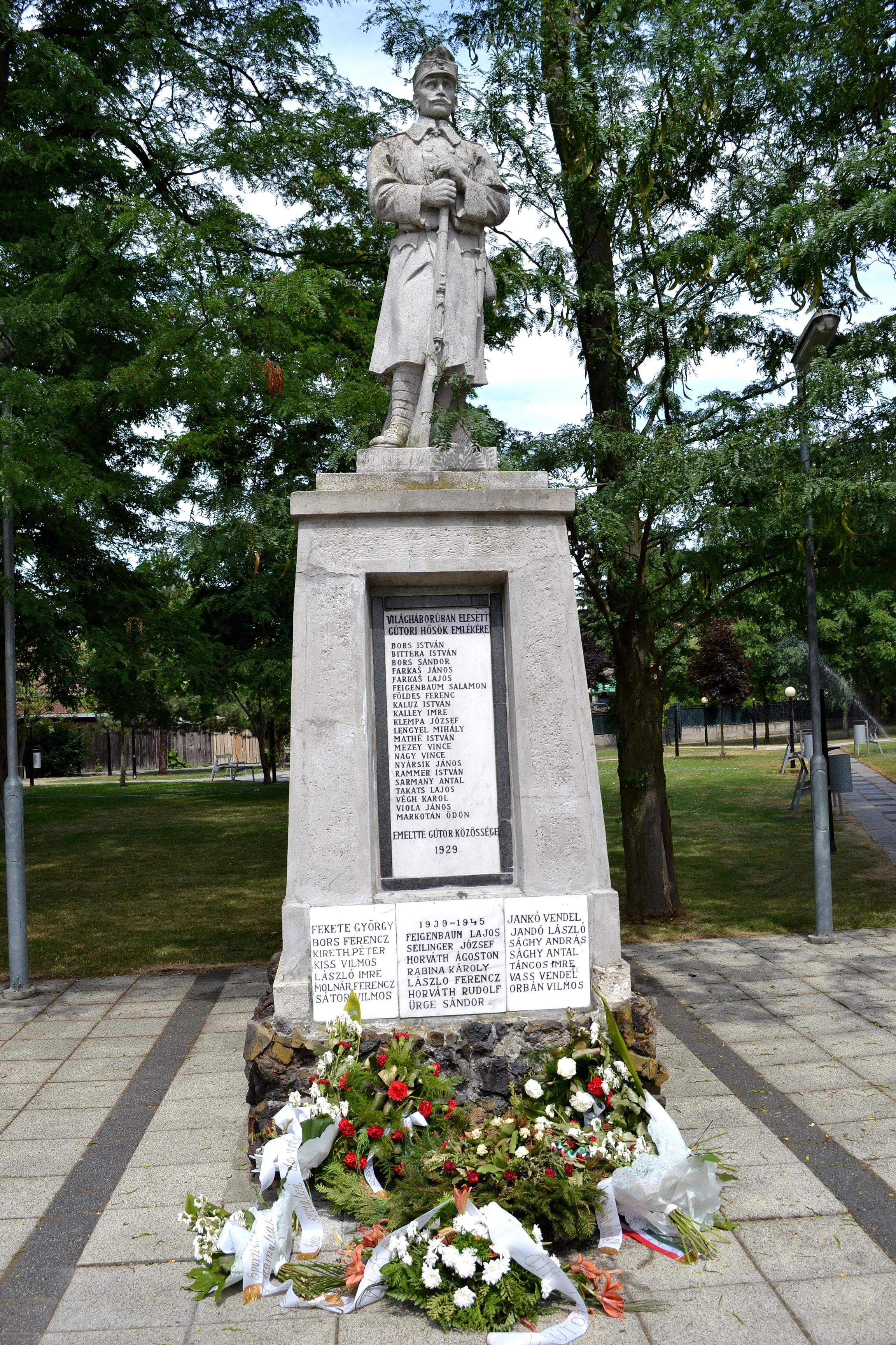 Pamätník obetiam svetových vojen v centre obce